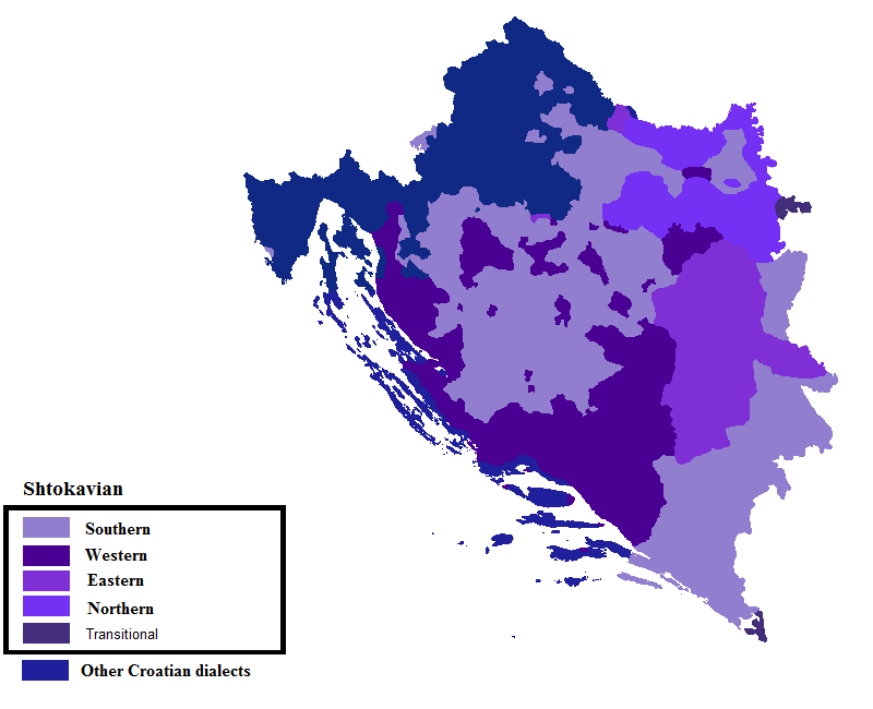 Grupe štokavskih dijalekata